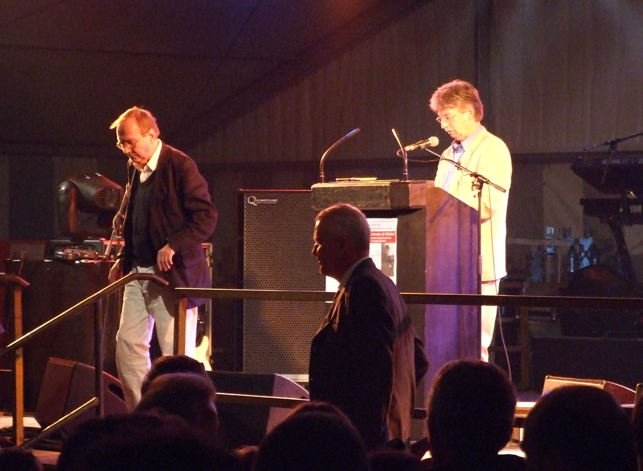 Stabwechsel von Ingomar von Kieseritzky zu Reinhard Jirgl in Bergen, 2007